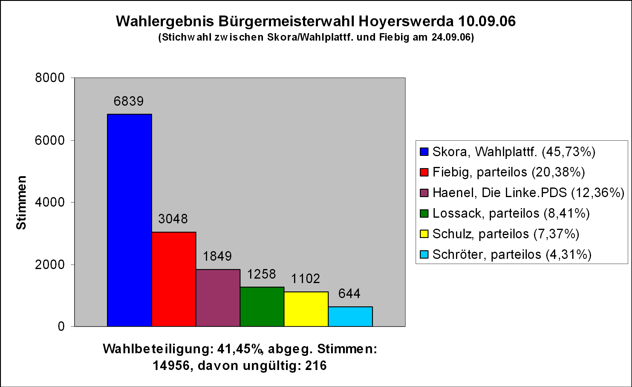 Wahlergebnis der Bürgermeisterwahl 2006 in Hoyerswerda